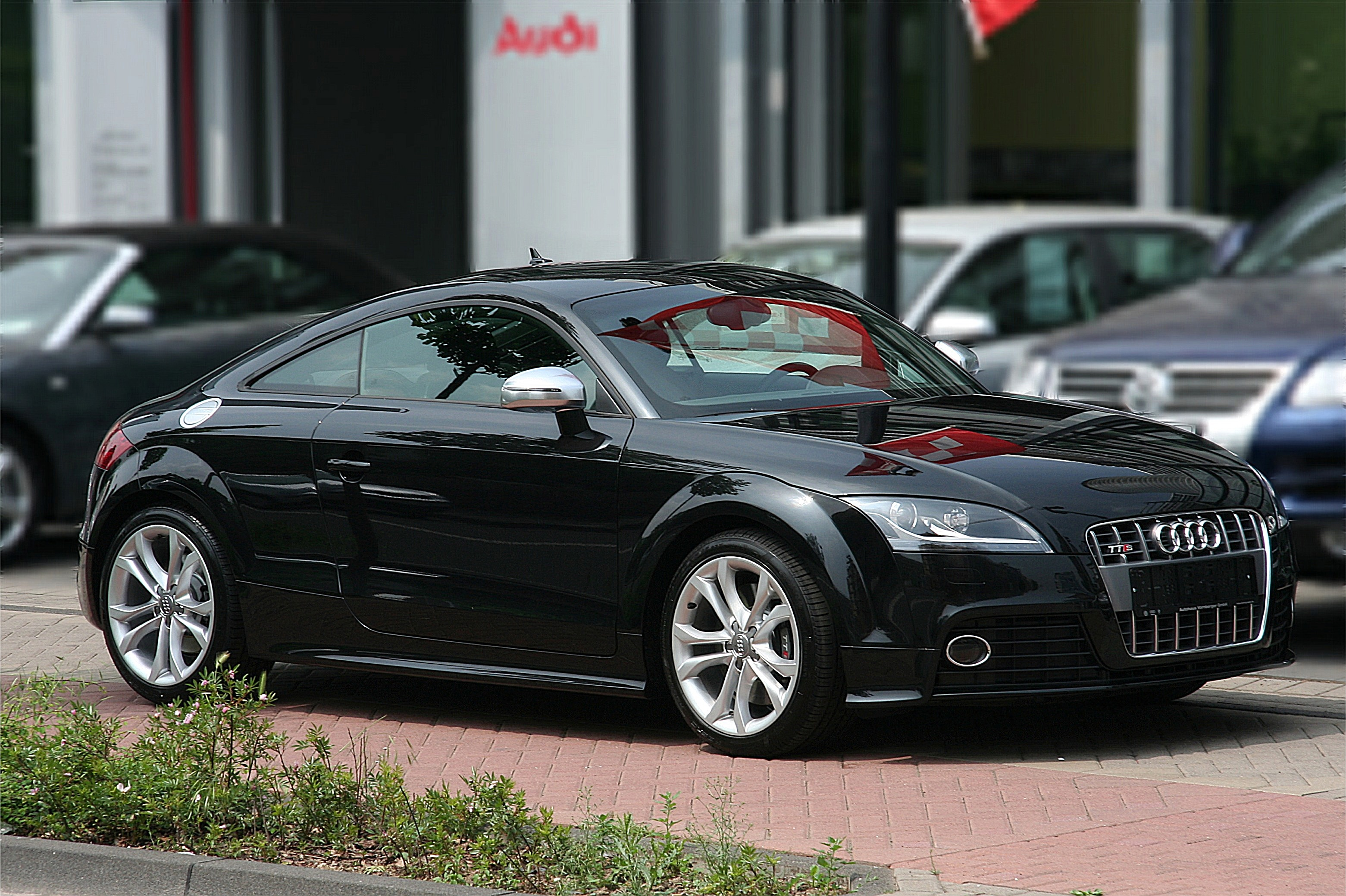 Audi TTS Coupé, Baujahr 2008